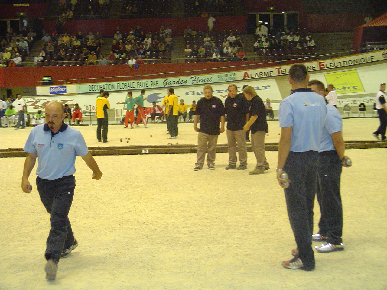 Reprezentanca Slovenije športa petanka na svetovnem prvenstvu v Grenobleu, leta 2004.